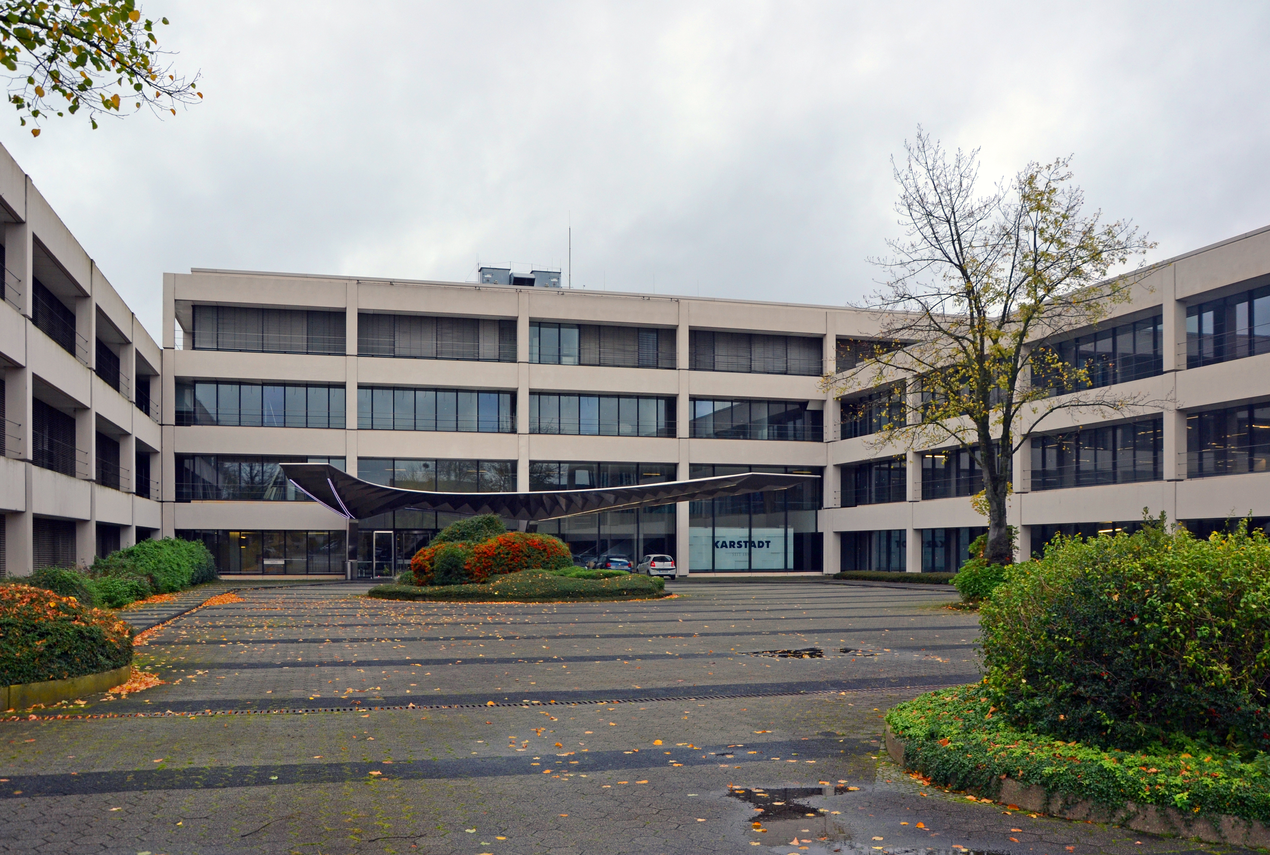 Essen-Schuir, ehemalige Karstadt Hauptverwaltung, unter Denkmalschutz